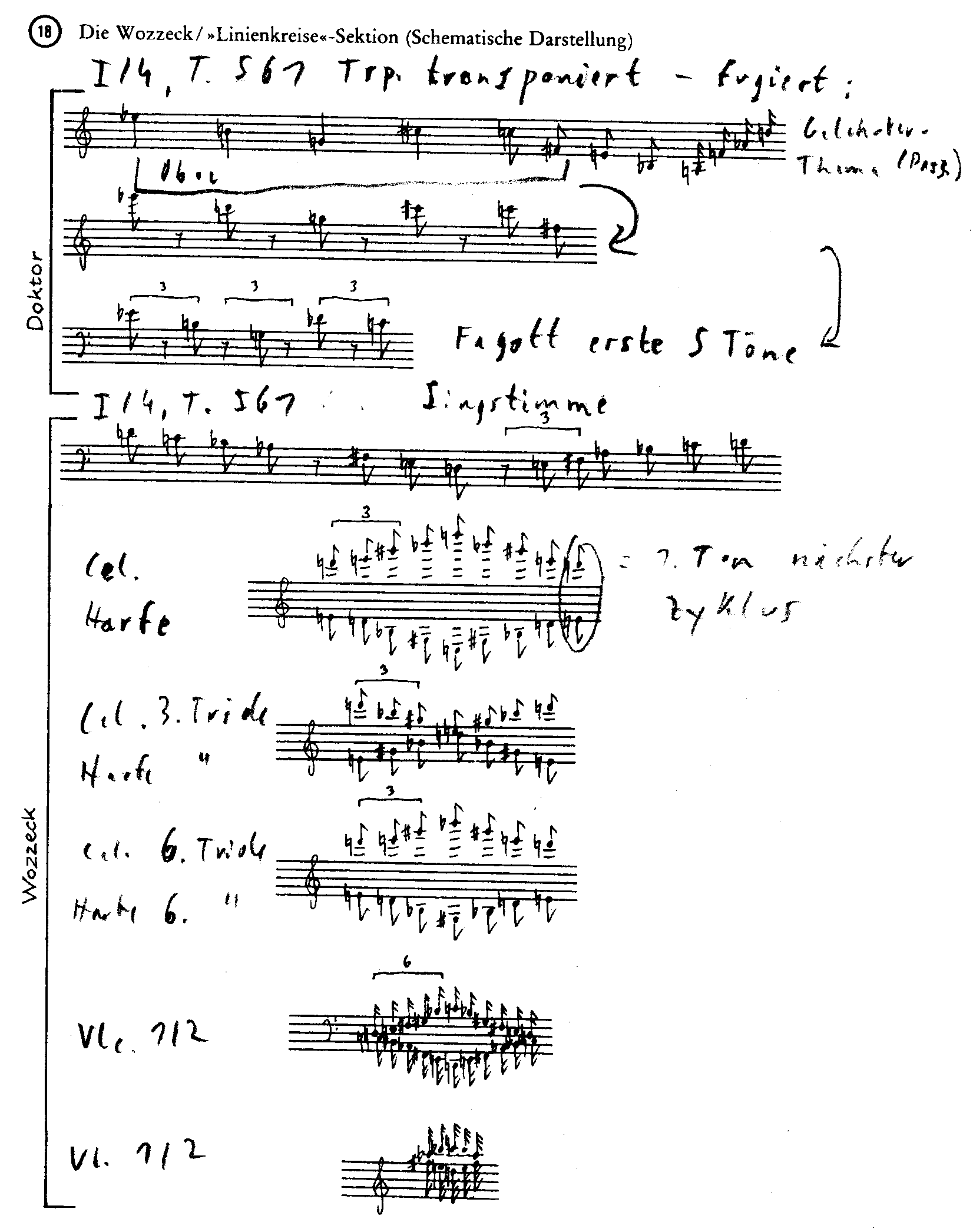 Schematische Darstellung der Partitur von Alban Bergs Wozzeck, Akt 1, Szene 4, Takt 561, unter Verwendung einer Transkription (geringe Schöpfungshöhe) aus Peter Petersen: Alban Berg, Wozzeck. Eine semantische Analyse unter Einbeziehung der Skizzen und Dokumente aus dem Nachlaß Bergs. Musik-Konzepte Sonderband, München 1985, S. 116. Wozzecks Text: "Linienkreise... Figuren... Wer das lesen könnte!"